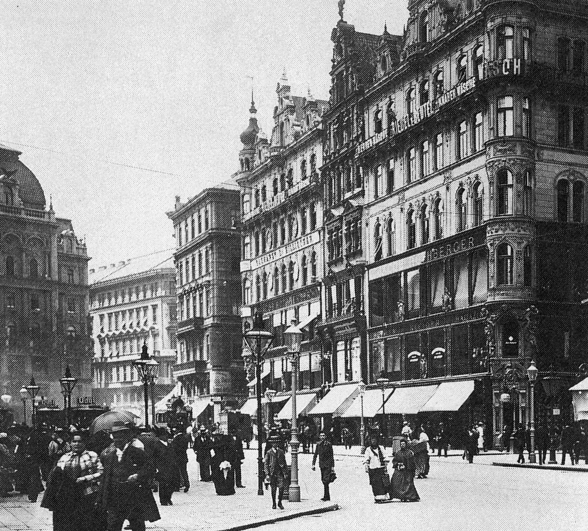 Wien, Stephansplatz, Warenhäuser Rothberger